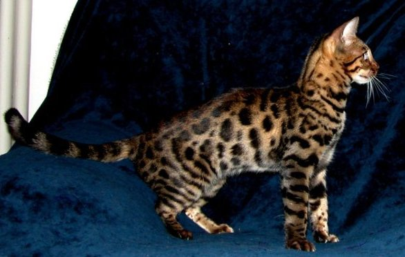 Bild Bengal Katzen Black Tabby Spotted - Gogees Captain Janeway